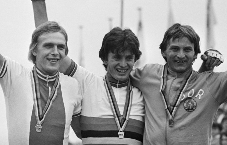 Wereldkampioenschappen Wielrennen 1979 te Valkenburg. Heren amateurs, huldiging van de nummers 1 , 2 en 3: Jan Jankiewicz, Polen 2e (l), Gianni Giacomini, Italië 1e (midden) en Bernd Drogan, DDR 3e